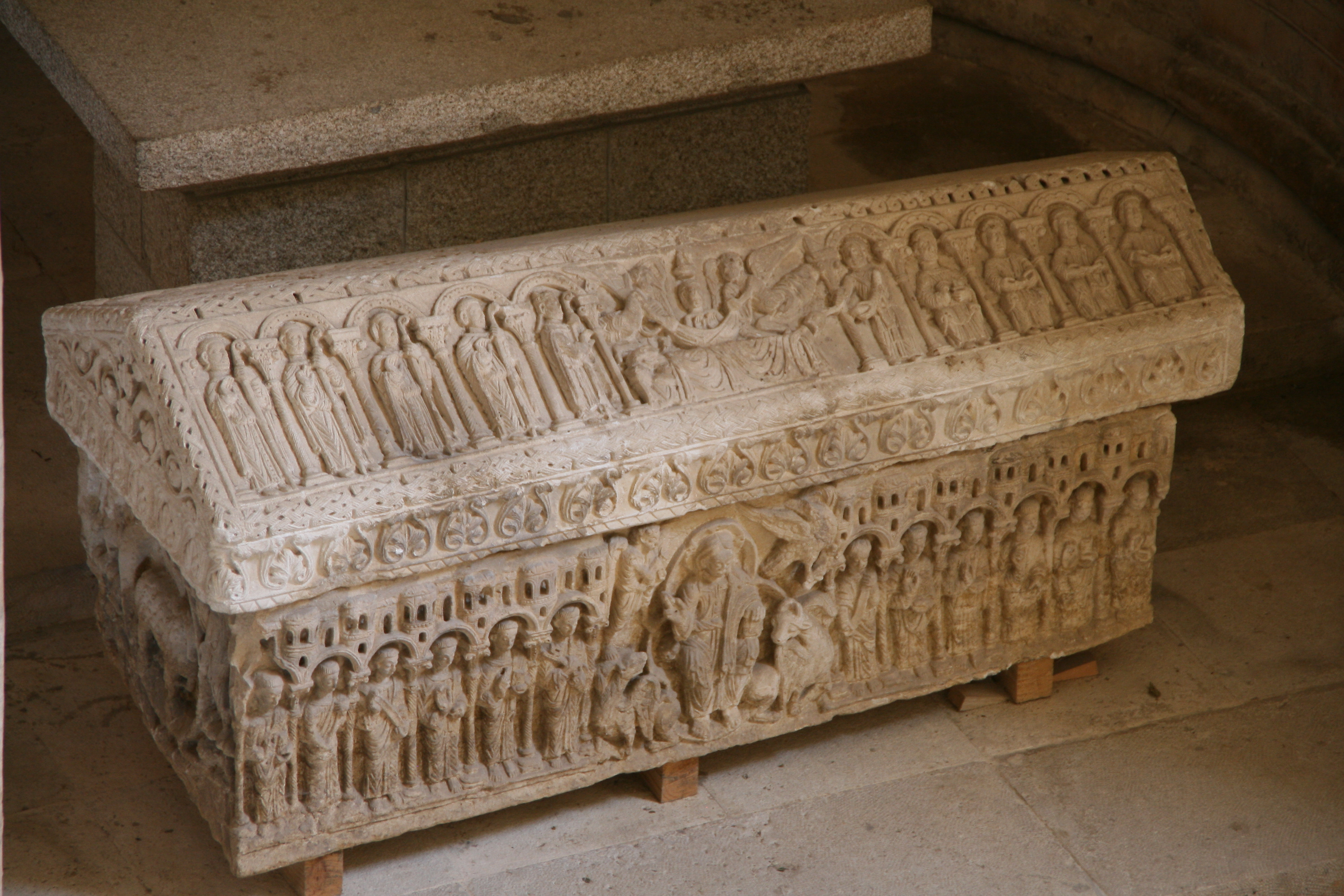 Sepulcro románico s. XII, encontrado encima del sepulcro de piedra lisa que contiene los restos del santo.